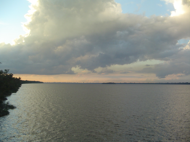 Baía do Guajará, próximo à foz do Rio Guamá - Belém,PA - Brasil